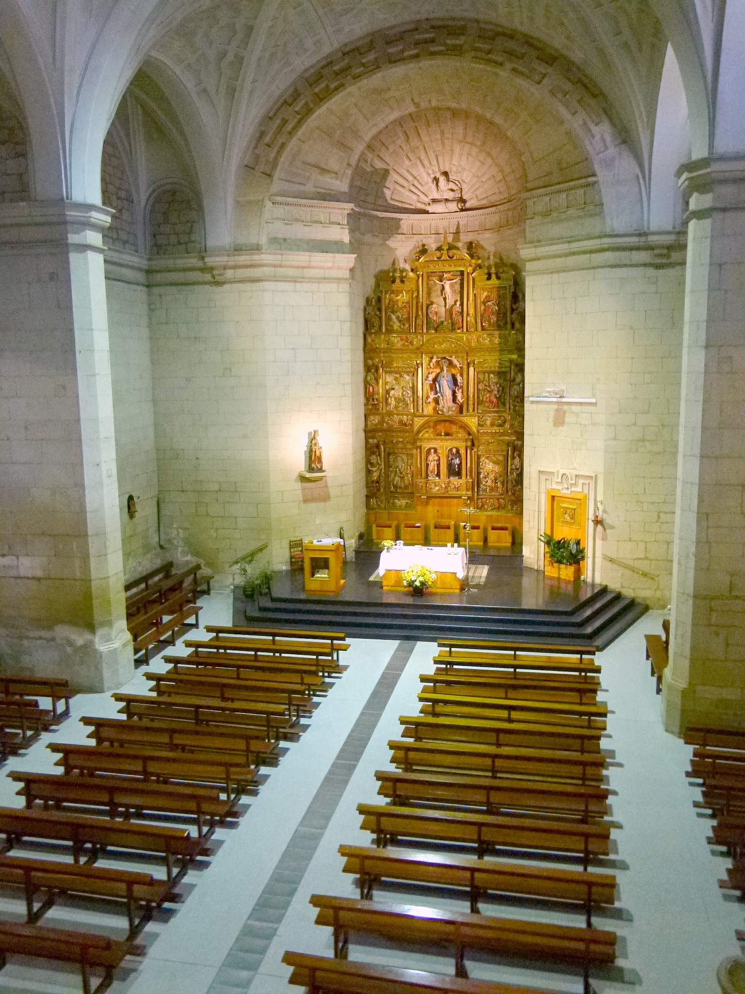 Iglesia de Santa María de la Asunción (Oyón, Álava)